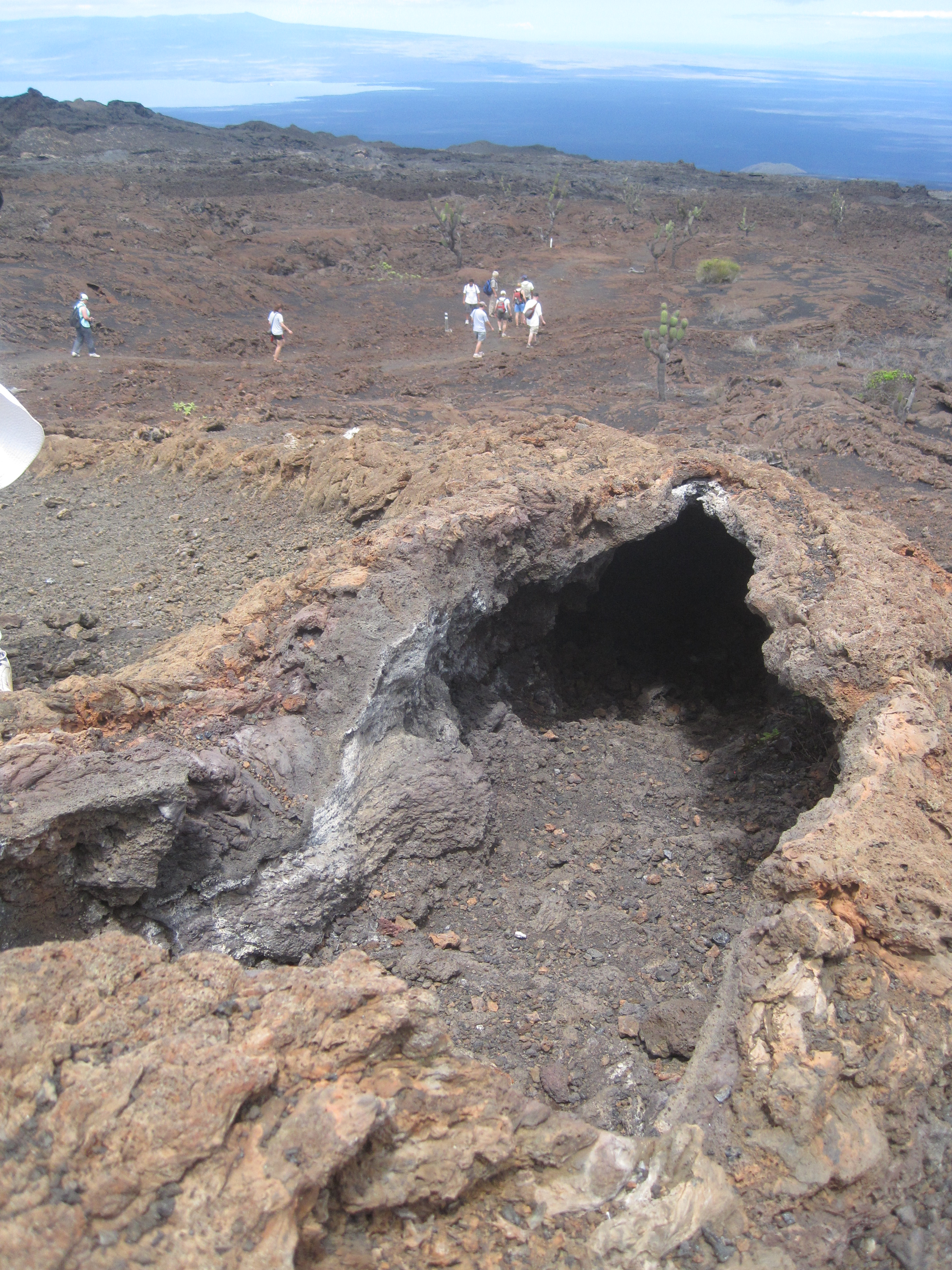 Lava Tunnel, Sierra Negro, Isabela Island, Galapagos.